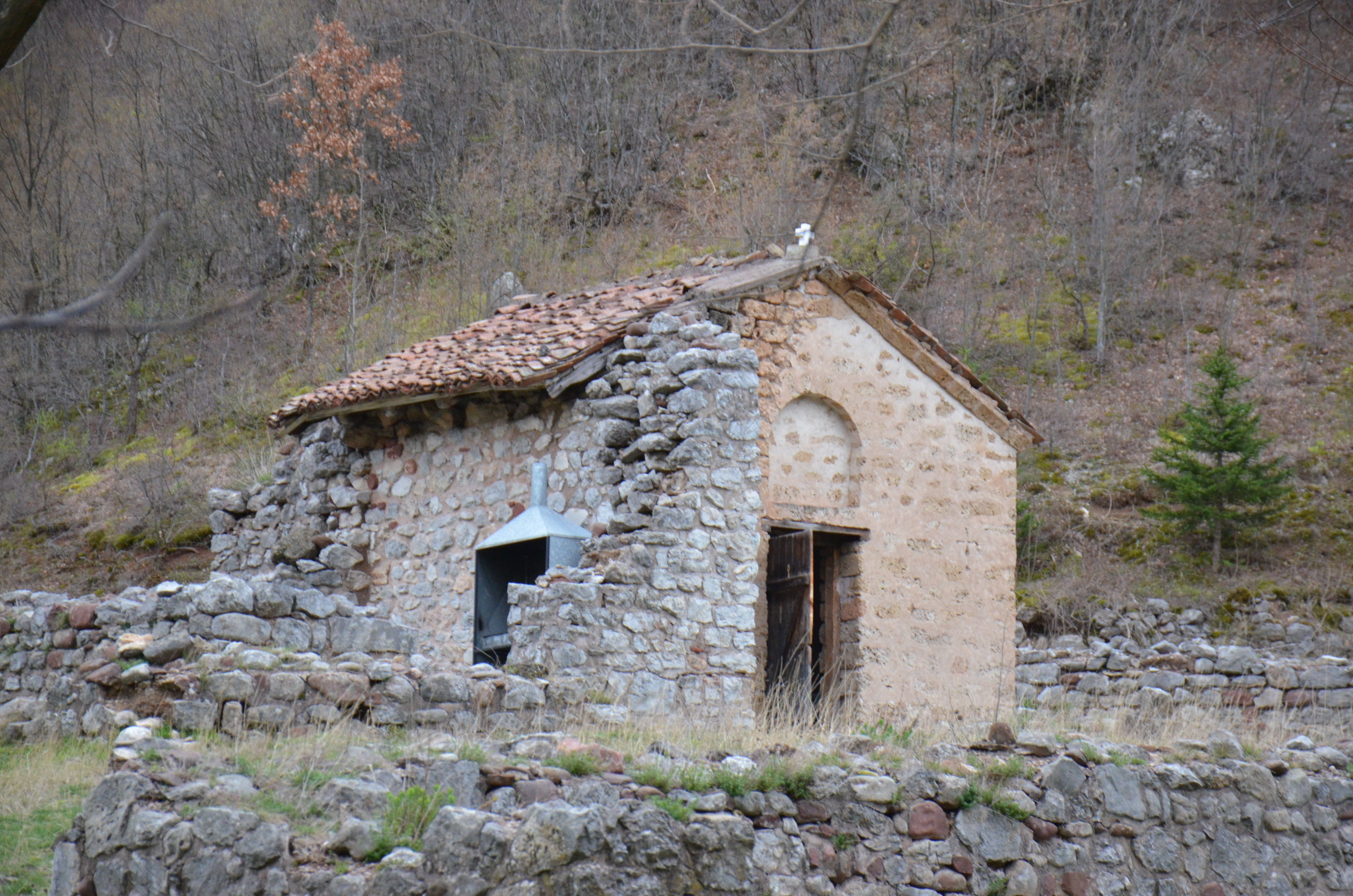 Споменик културе - Манастирски комплекс Намасија